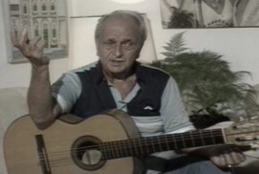 Músico brasileiro Herivelto Martins em imagem do acervo da TV Brasil.